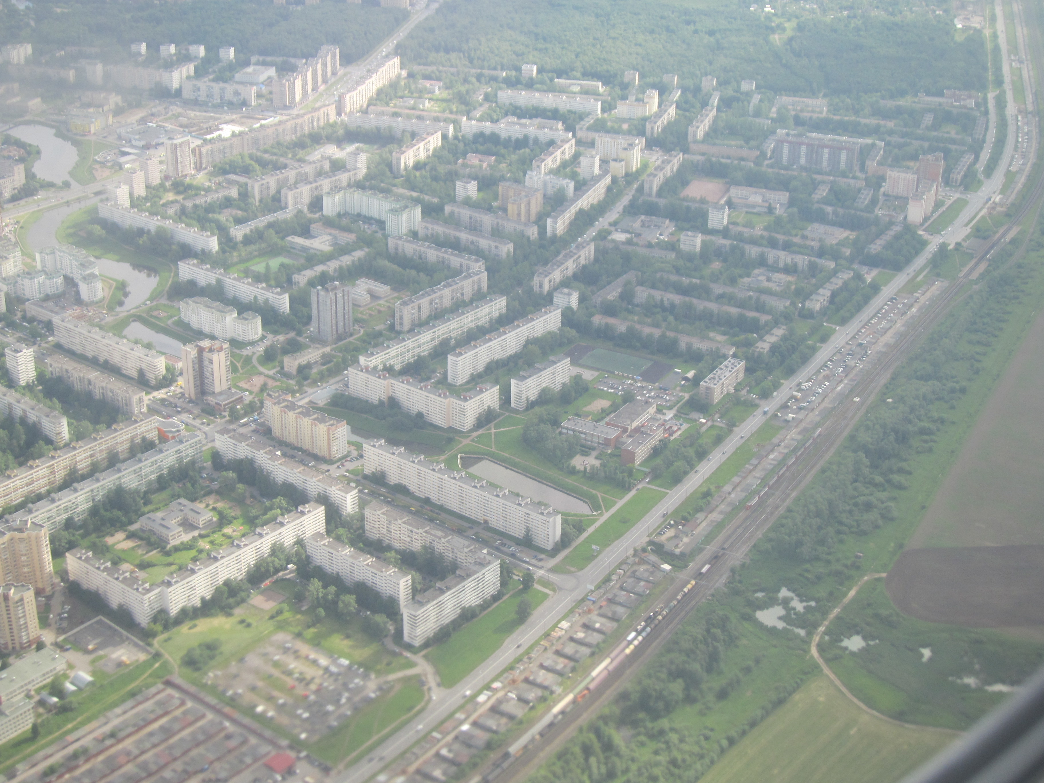 Вид на микрорайон Ульянка (Санкт-Петербург) с самолёта